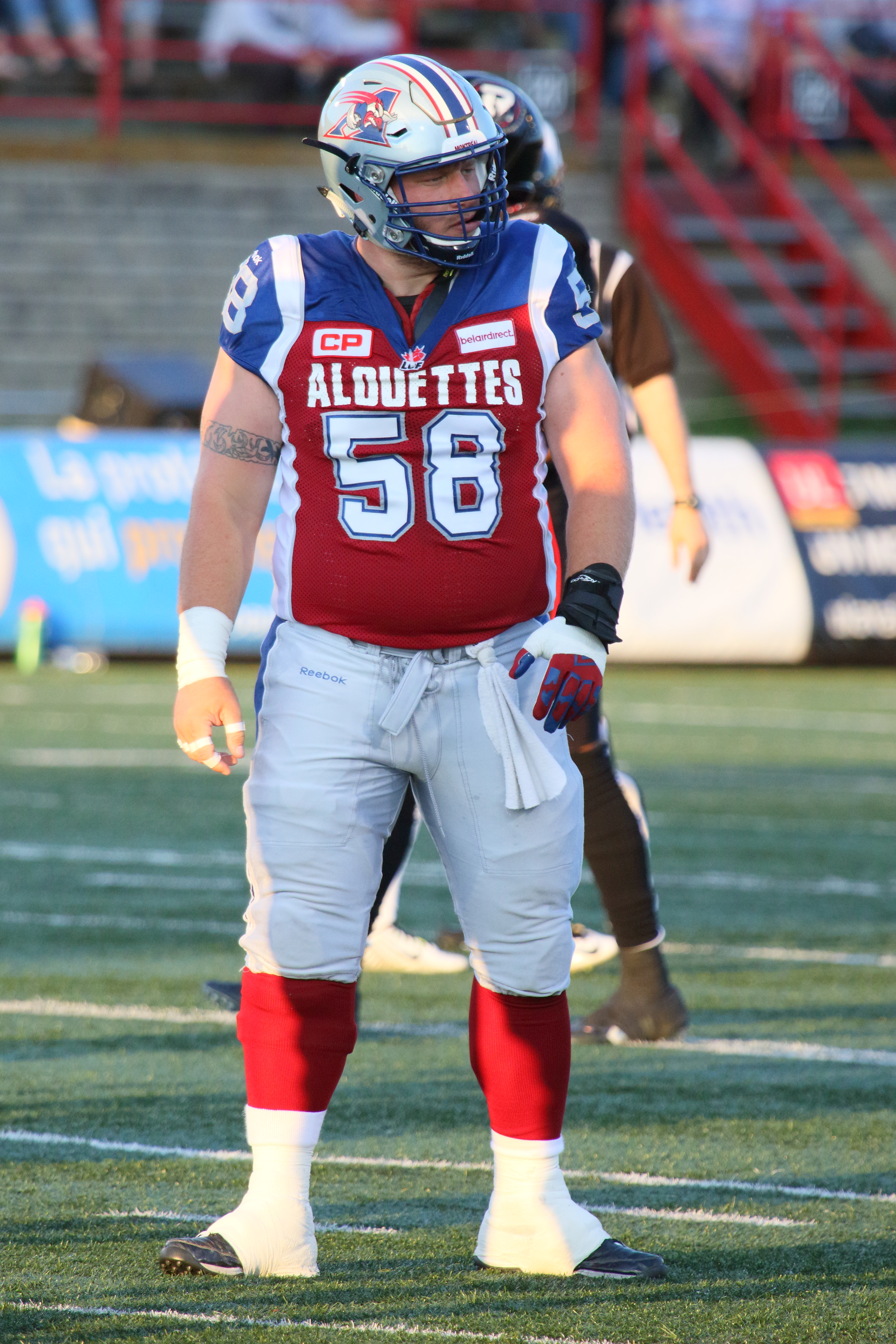 Luc Brodeur-Jourdain, Alouettes de Montréal, lors d'un match préparatoire contre le Rouge et Noir d'Ottawa